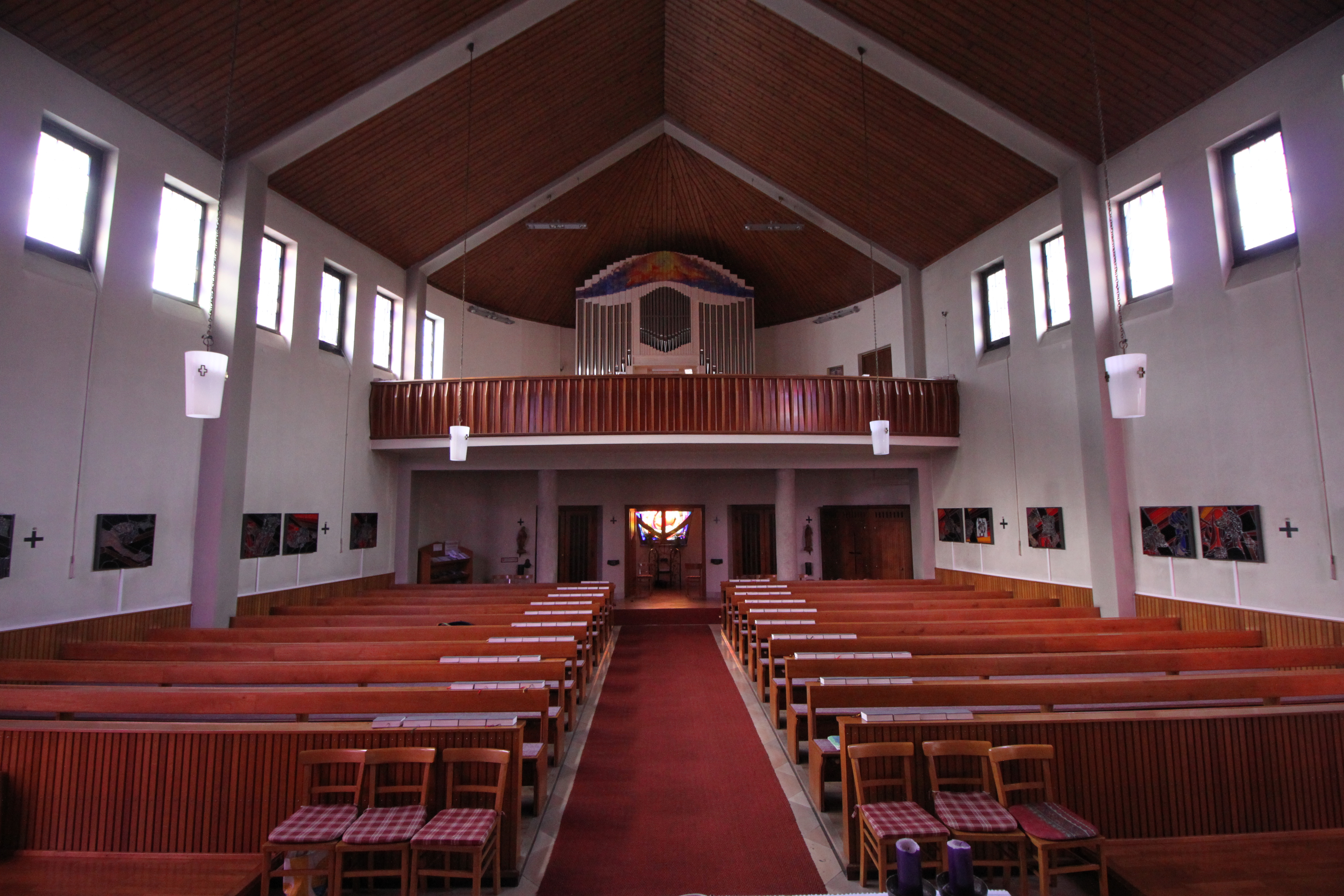 Kath. Filialkirche hl. Josef der Arbeiter, vom Altar zur Orgelempore